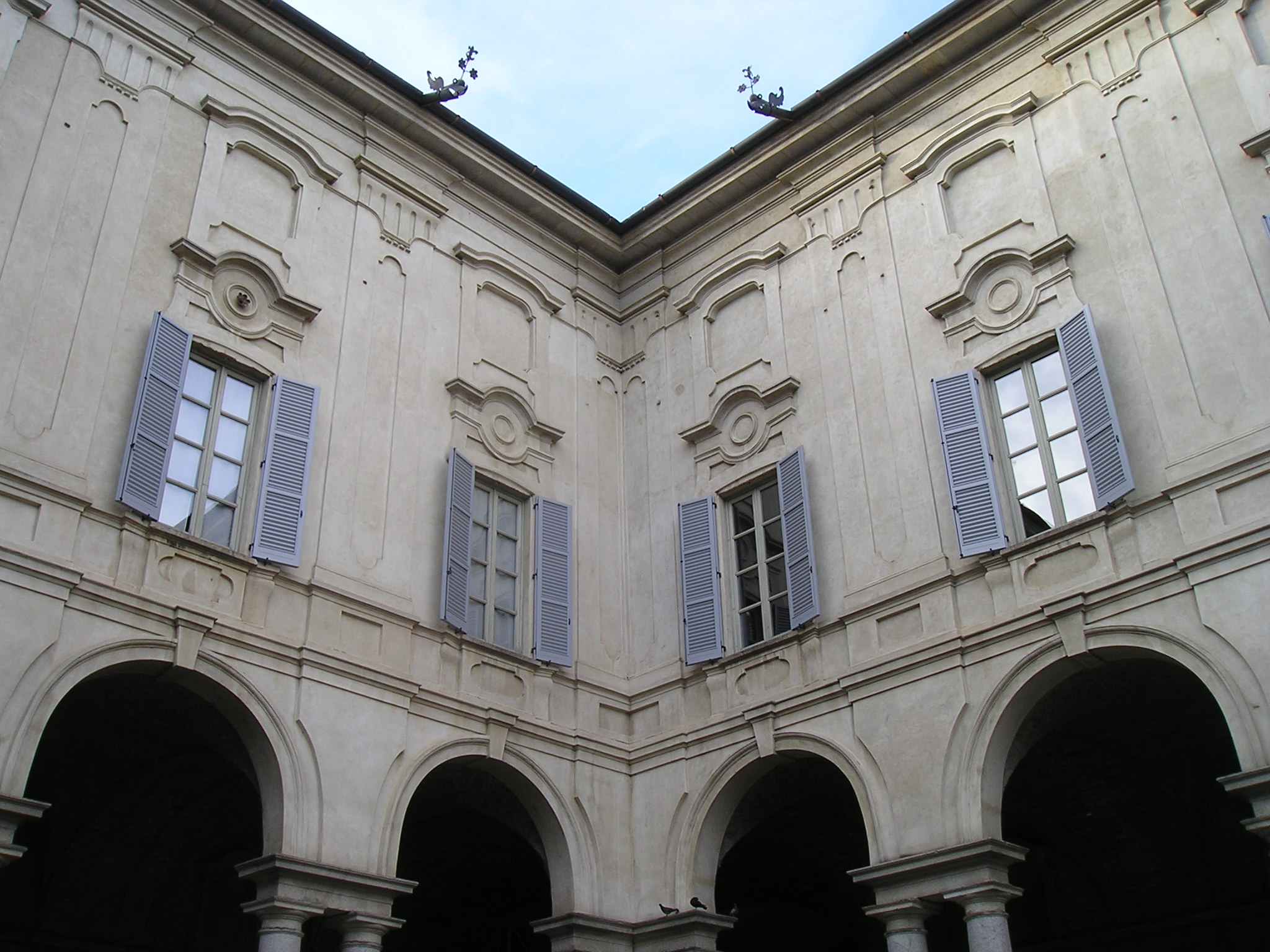 Cortile del palazzo vescovile di Lodi